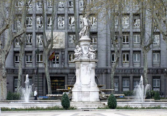 Fuente de Apolo. Paseo del Prado, Madrid (España). Realizada entre 1780 y 1803 por los escultores Manuel Álvarez y Alfonso Bergaz, según un diseño de Ventura Rodríguez.